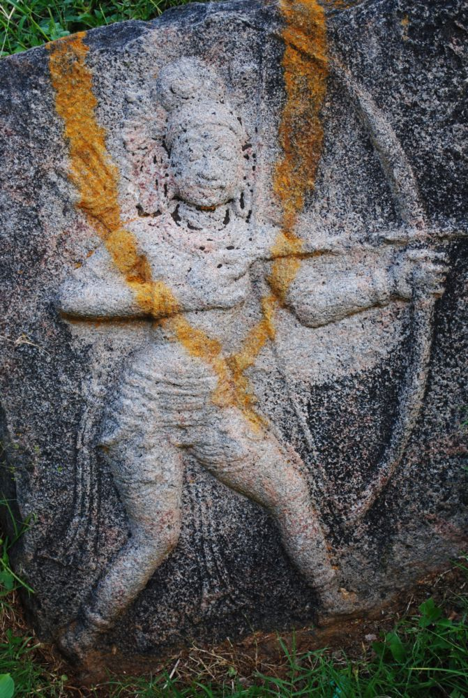 கொளக்கரவாடி ஏரிக்கரையில் உள்ள இந்நடுகல் 12 ஆம் நூற்றாண்டைச்சேர்ந்தது. அம்பரா துணியுடன் அமைந்த அரிய வகை நடுகல்